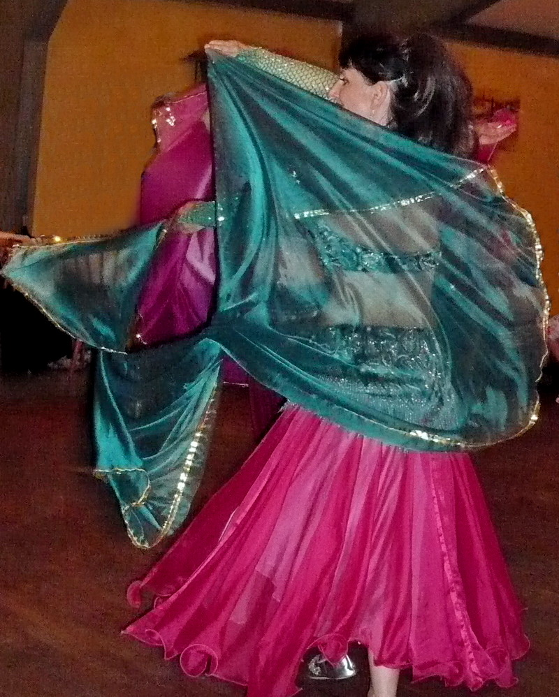 Orientalische Tänzerin mit günem Schleiertuch.